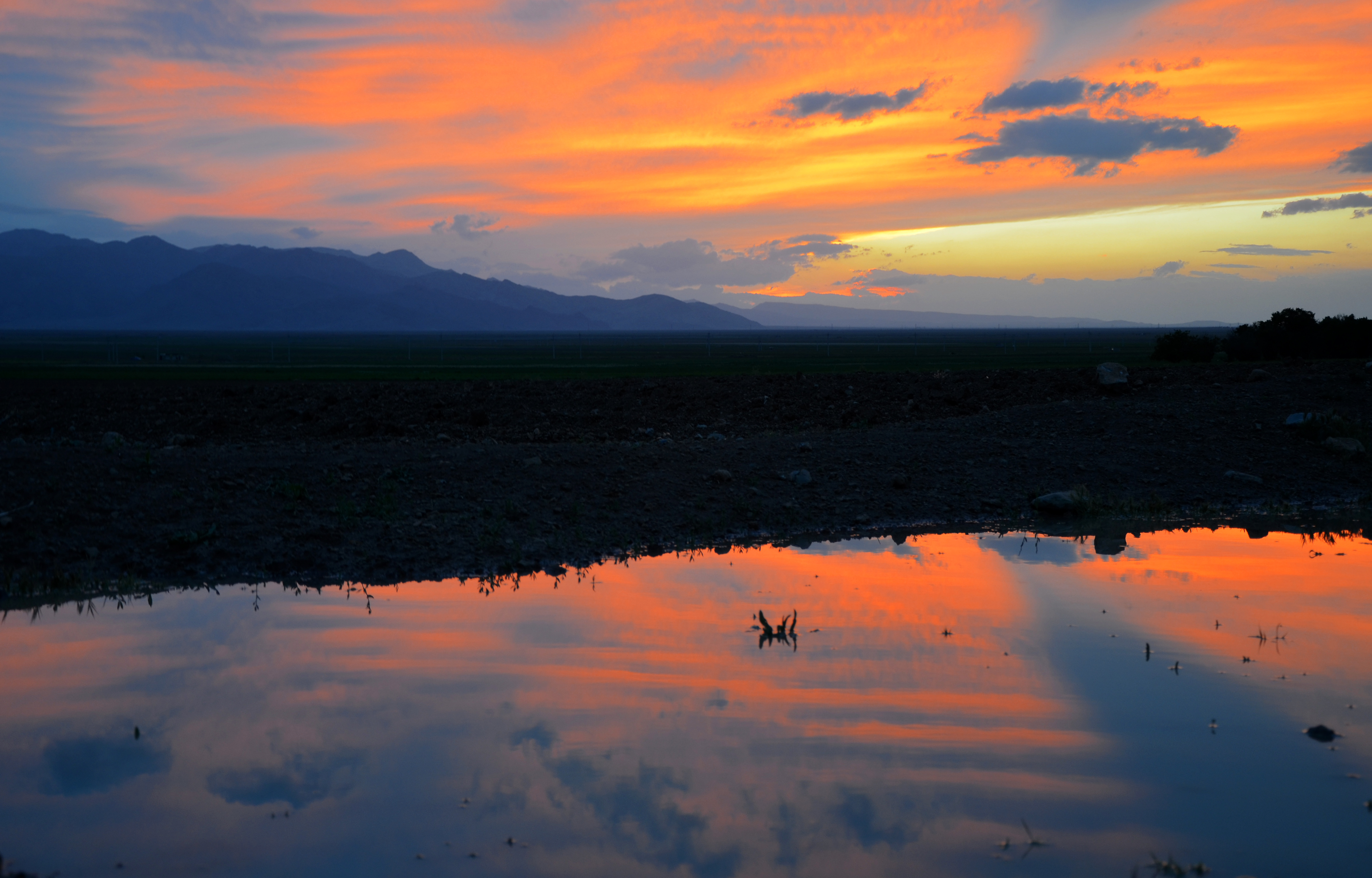 Eghlid - Khonjesht